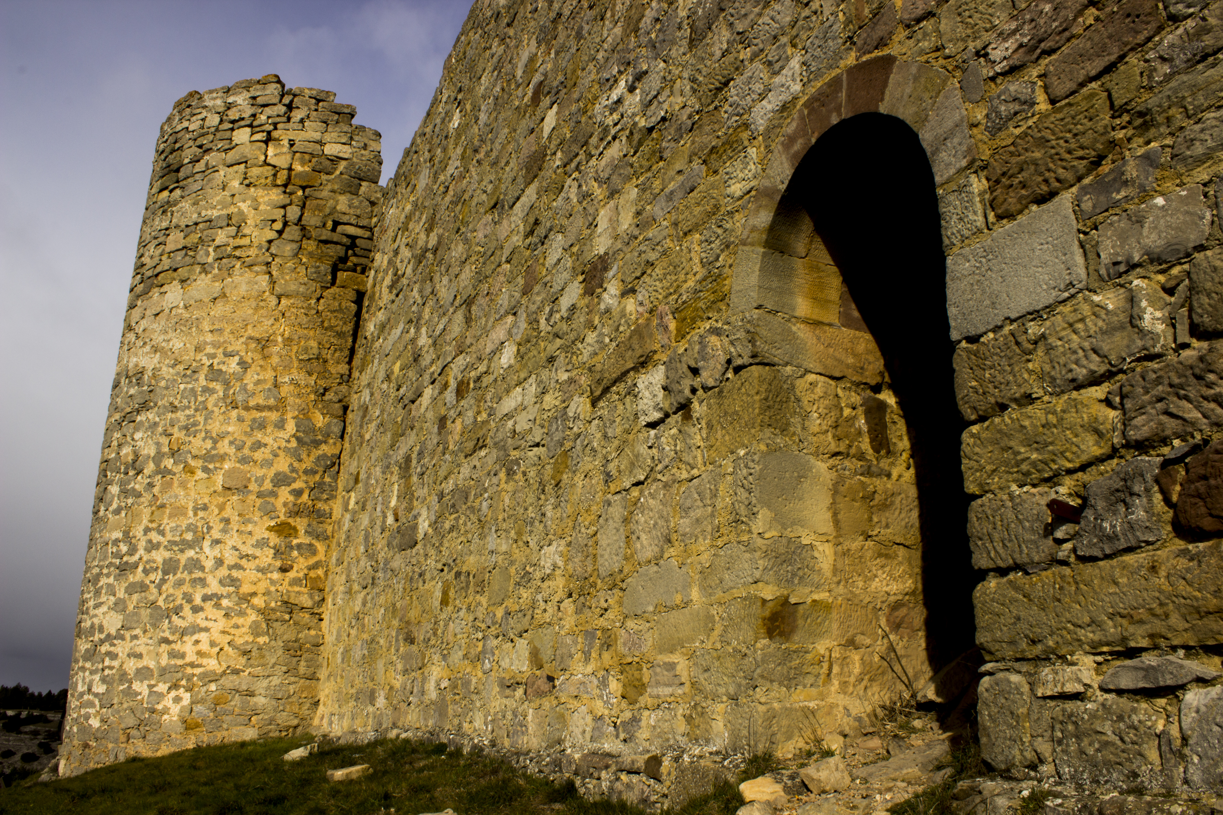 Se muestra una de las caras laterales del castillo de Aguilar de Campoo, restos de una poderosa fortificación de los siglos XIII y XIV.